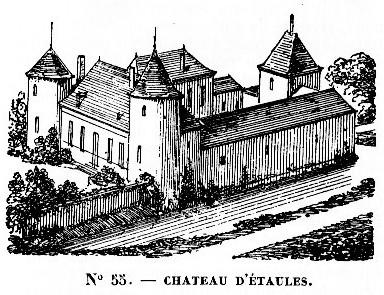 dessin du château d'Etaules (Yonne)